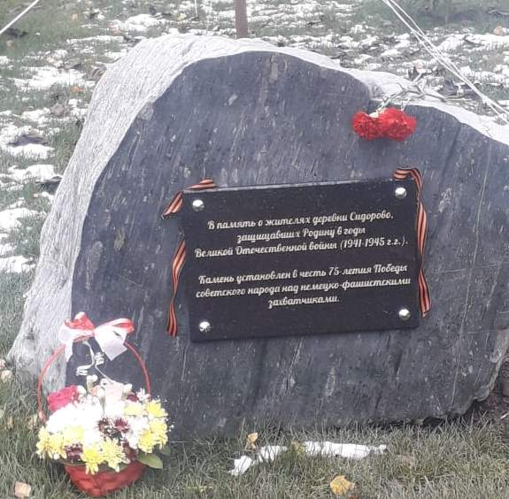 Камень, установленный в честь 75-летия победы за 7 месяцев до даты 75-летия. Истинная цель установки камня - перекрытие движения по автомобильной дороге.